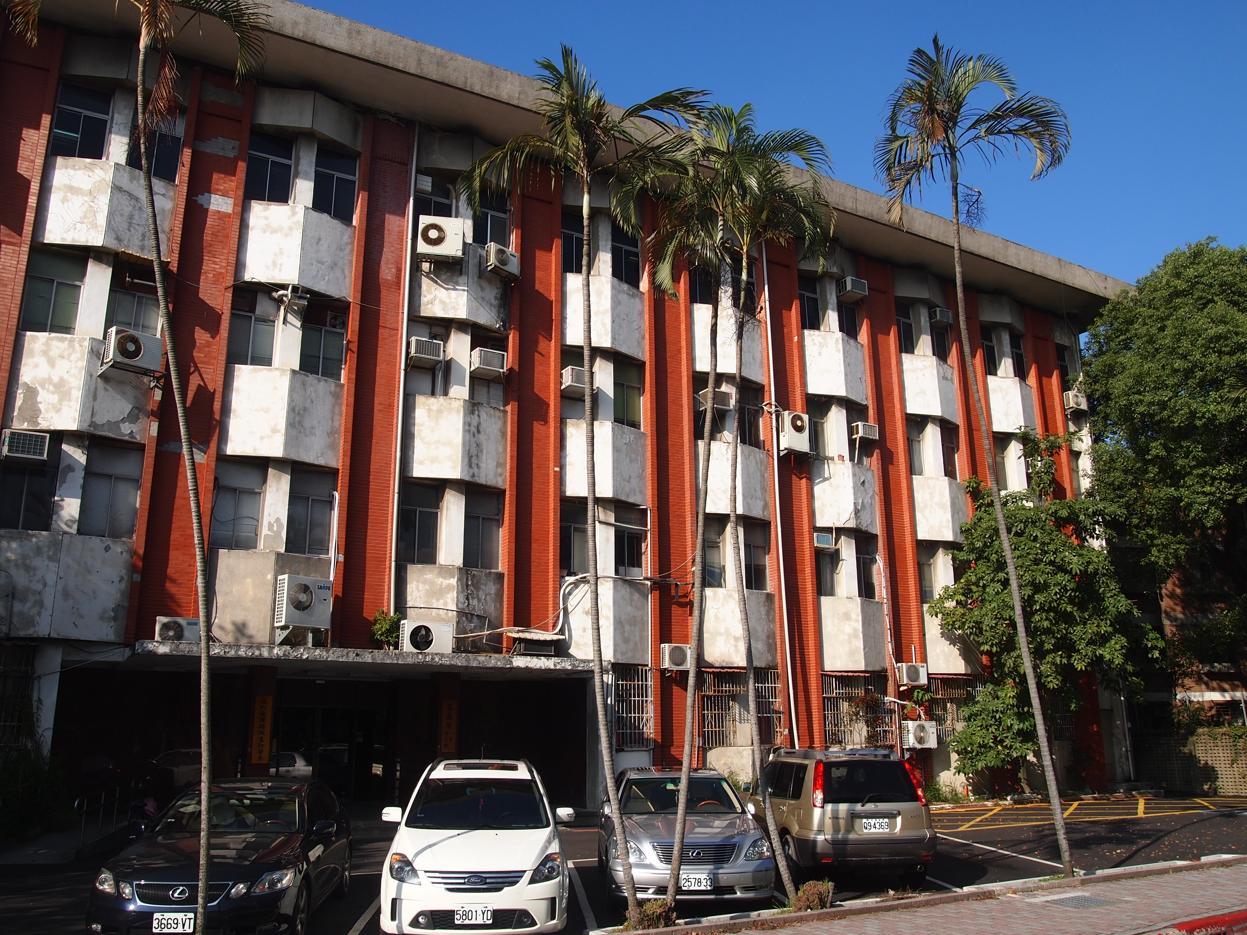 中文（台灣）: 國立臺灣大學中非大樓特有的外觀設計。